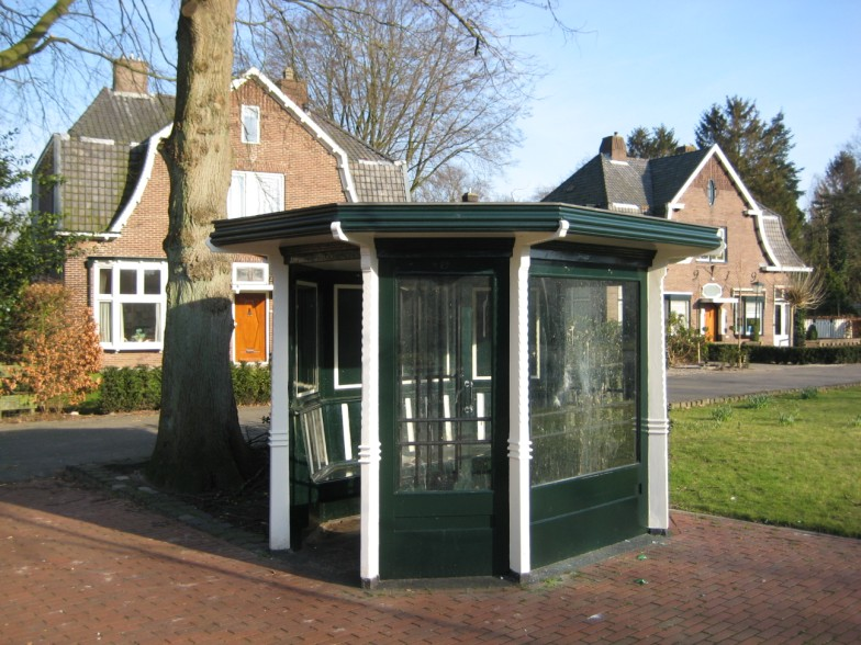 Tramwachthokje in Haren